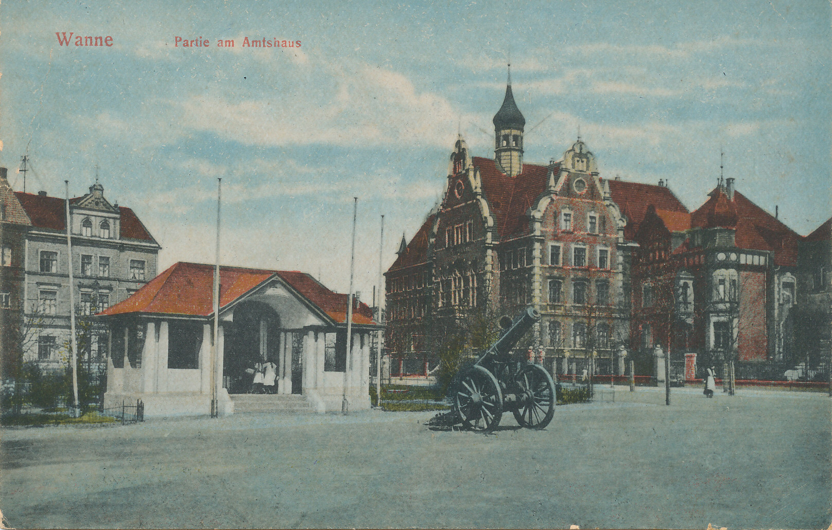 Wanne, Rathaus vor 1919 (vermutlich vor 1914, in Anbetracht der aufgestellten Kanone)